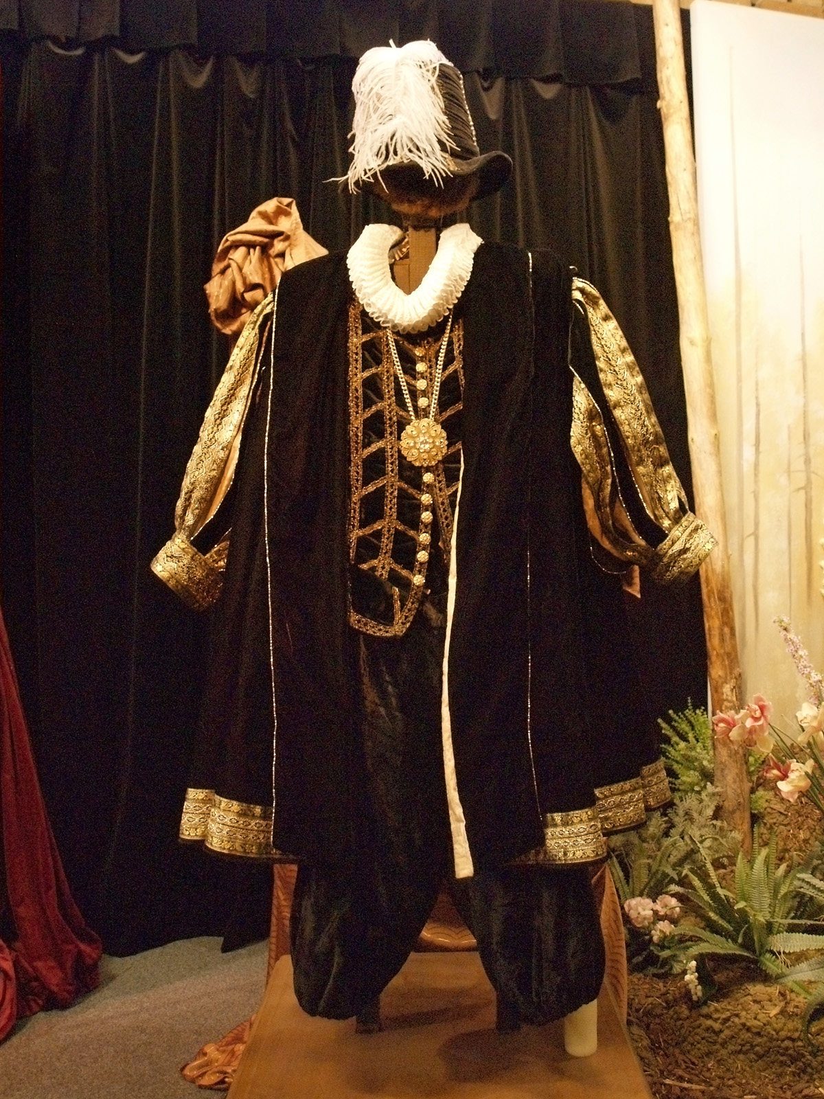 Údajný kostým z filmu Císařův pekař v expozici České televize v bývalém studiu R14 na Kavčích horách